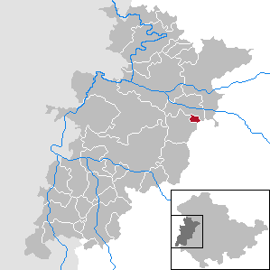 Seebach in Thuringia - Wartburgkreis